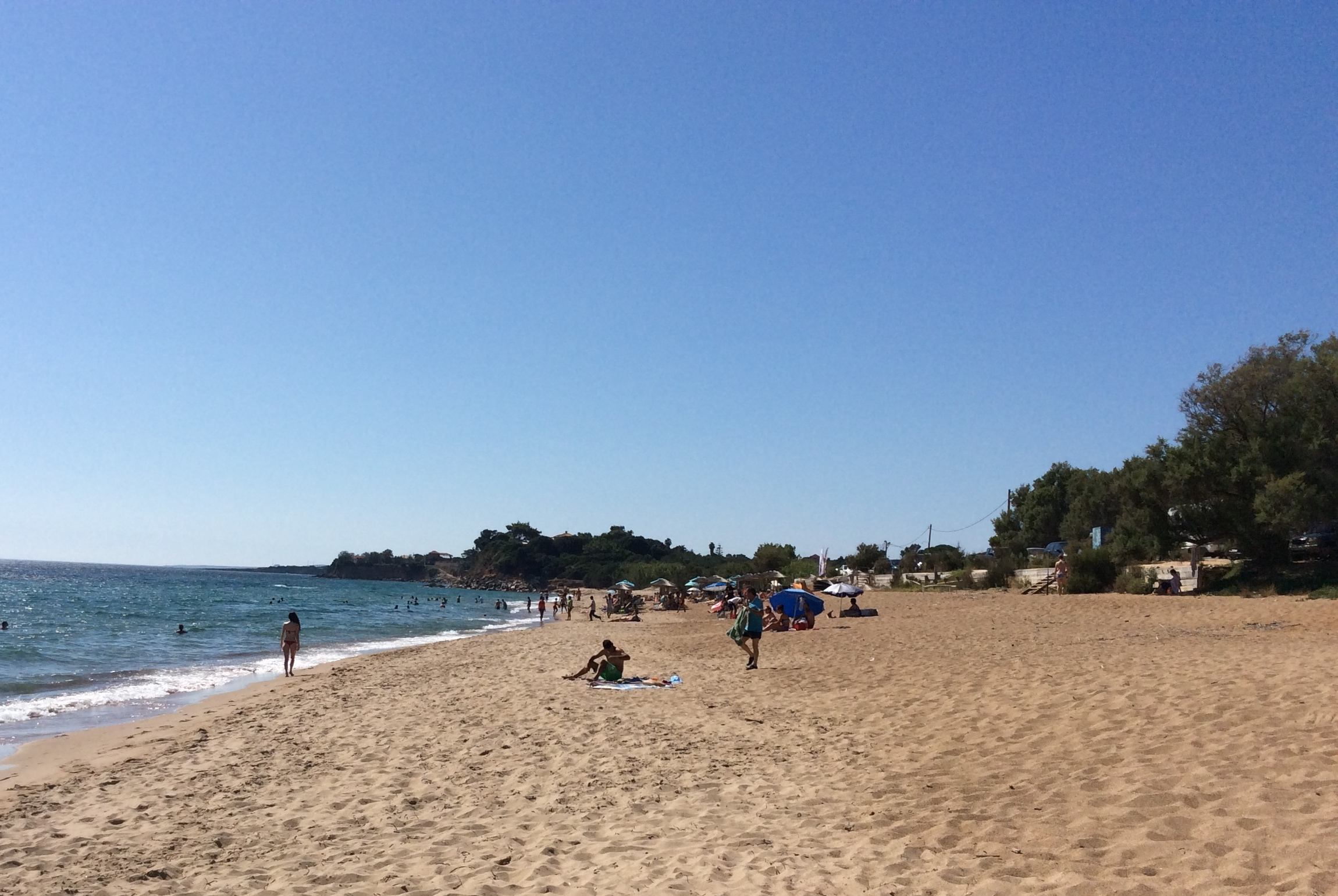 Ρίκια Μεσσηνίας - Άποψη της παραλίας της Χρυσής Ακτής προς τα βορειοδυτικά.